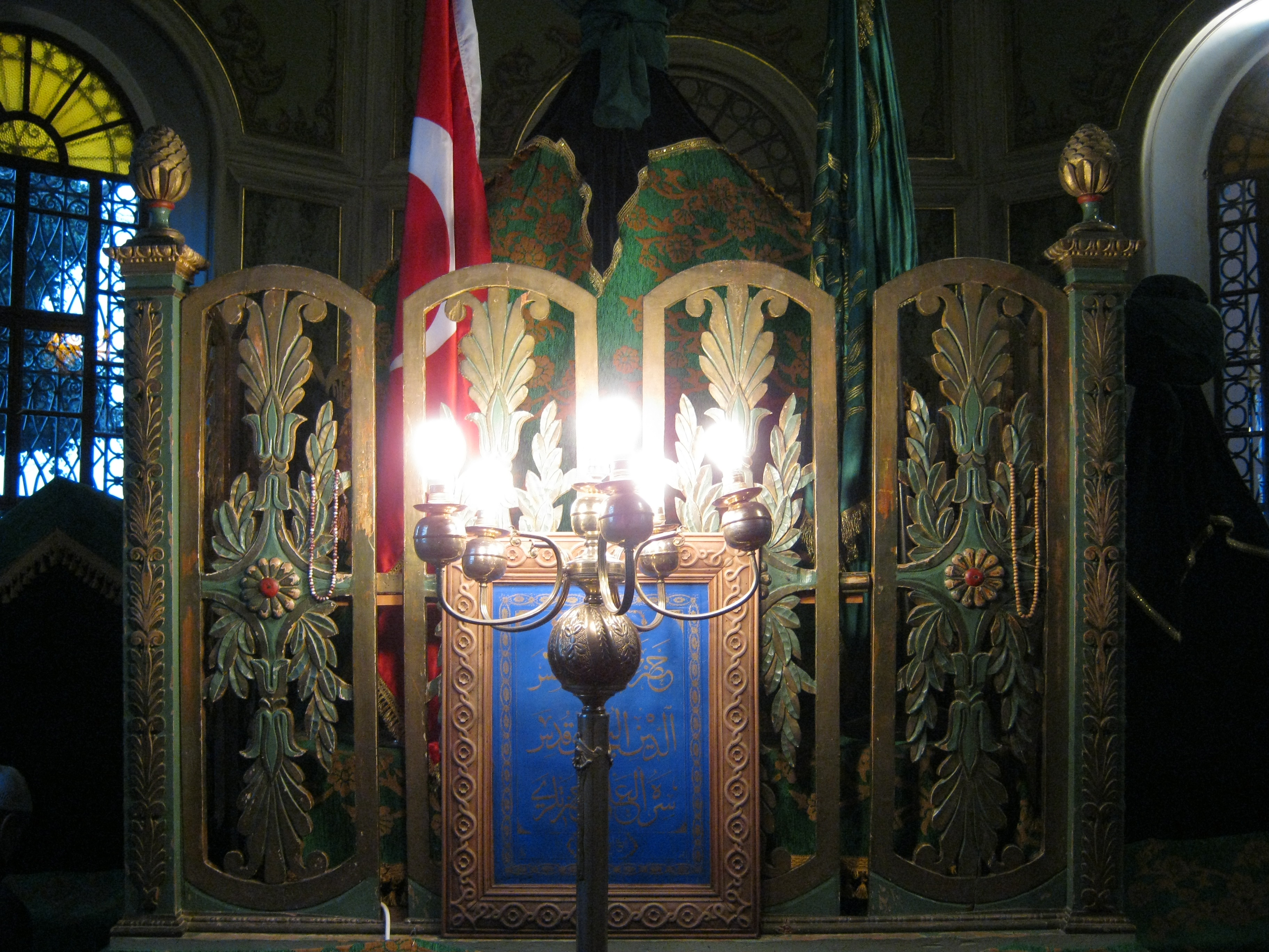 Emirsultan Türbesi Bursa